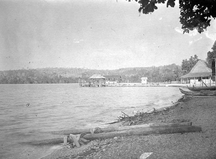 Repronegatief. Gezicht op de pier van Amahei